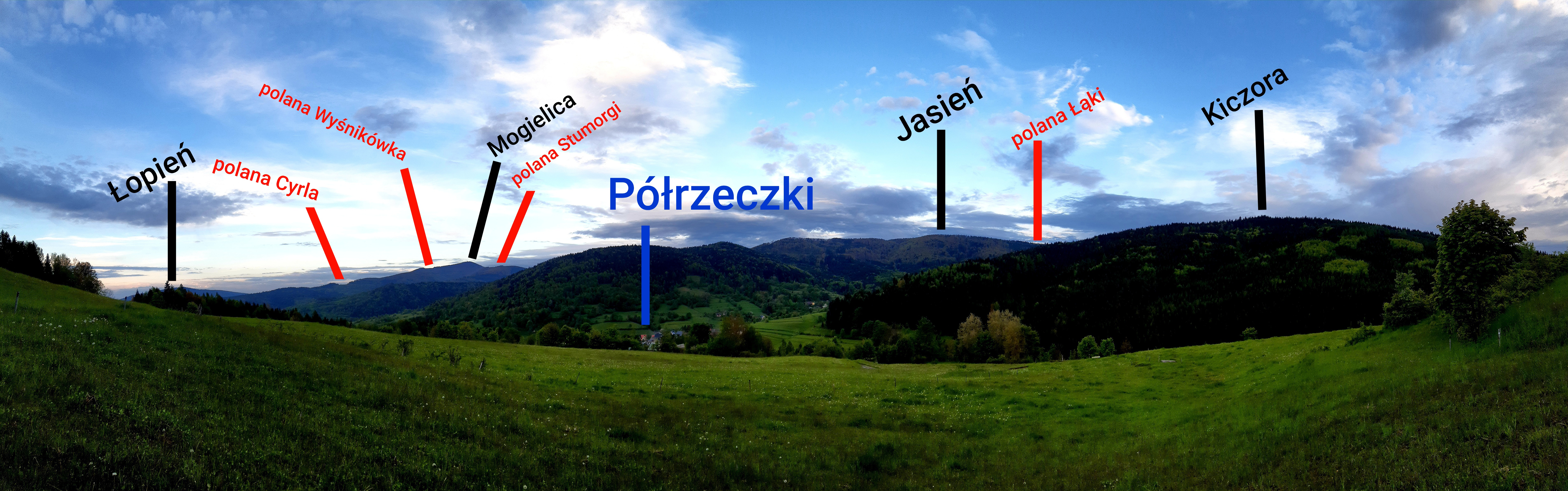 Widok z płd-wsch zboczy Kiczorki w Półrzeczkach